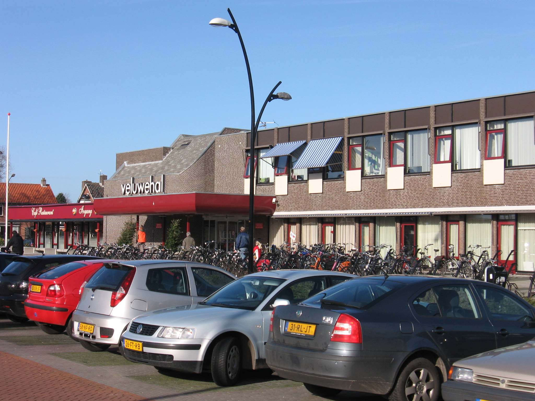 Barneveld